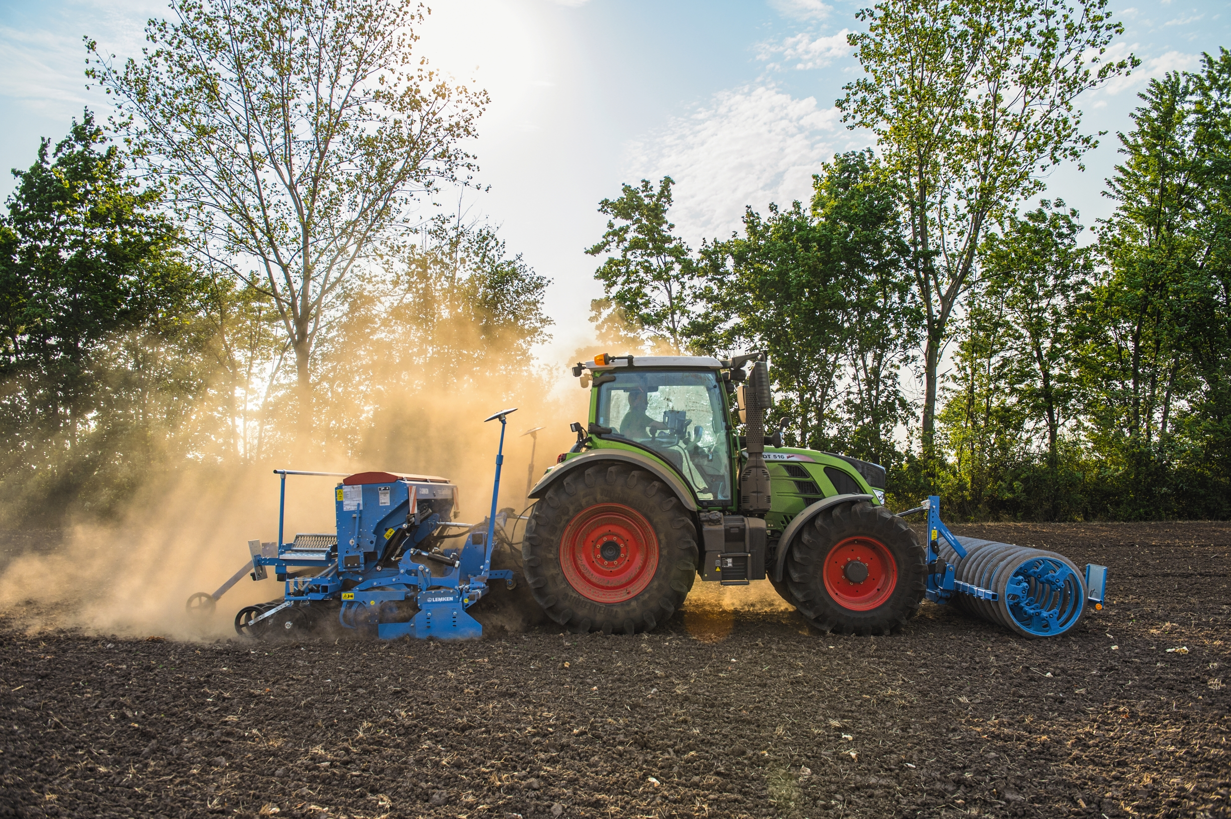 Fendt 516 Vario mit Lemken Sämaschine